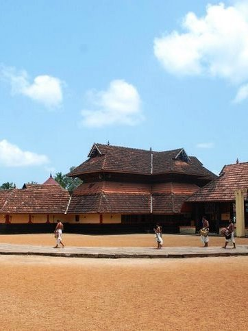 മാന്നാർ മഹാദേവക്ഷേത്രം കിഴക്കേനട, മാന്നാർ, മാവേലിക്കര